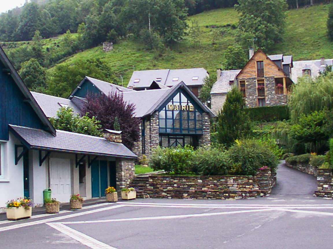 Loudenvielle dans les Hautes-Pyrénées Midi-Pyrénées